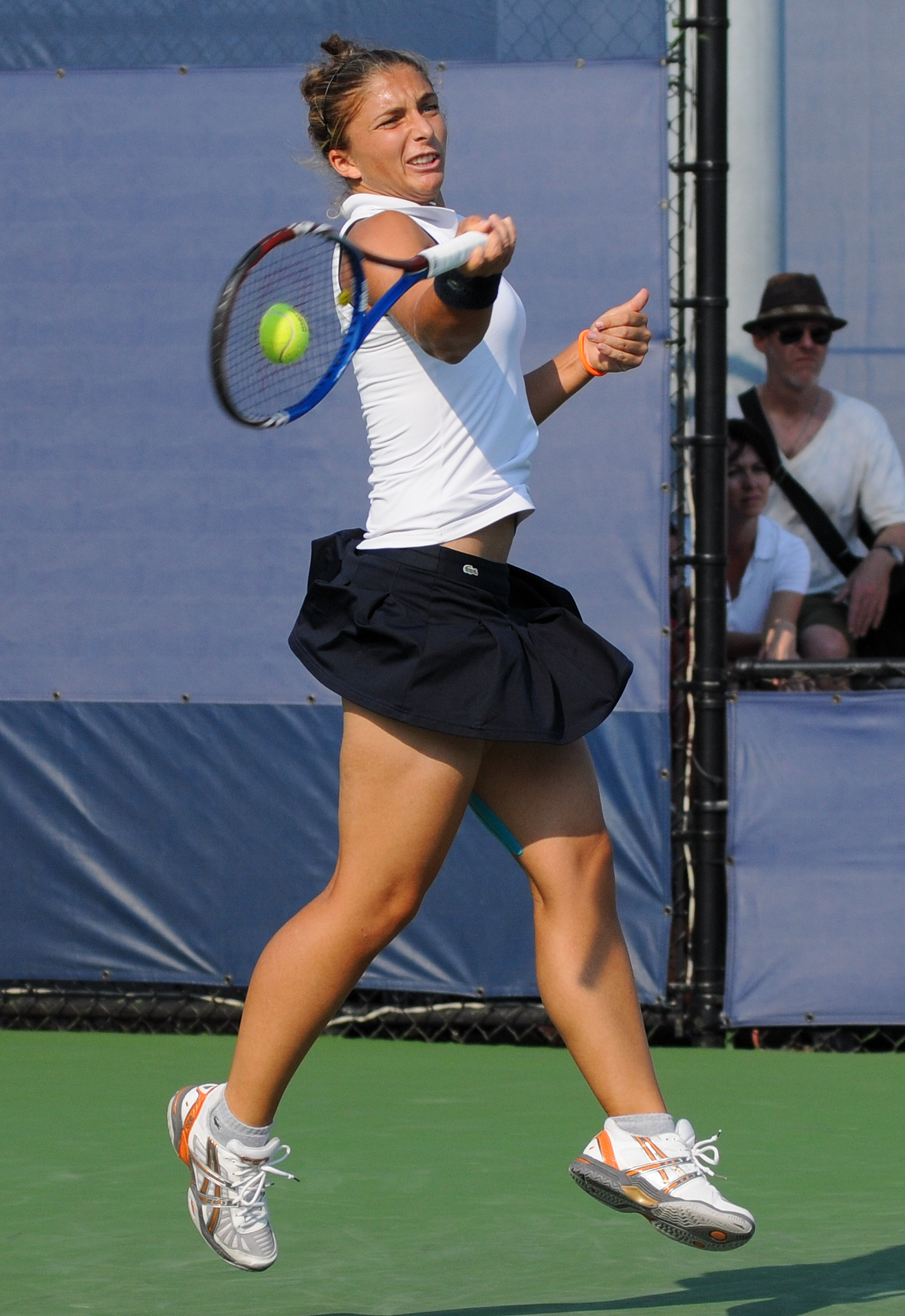 Sara Errani - US Open 2010